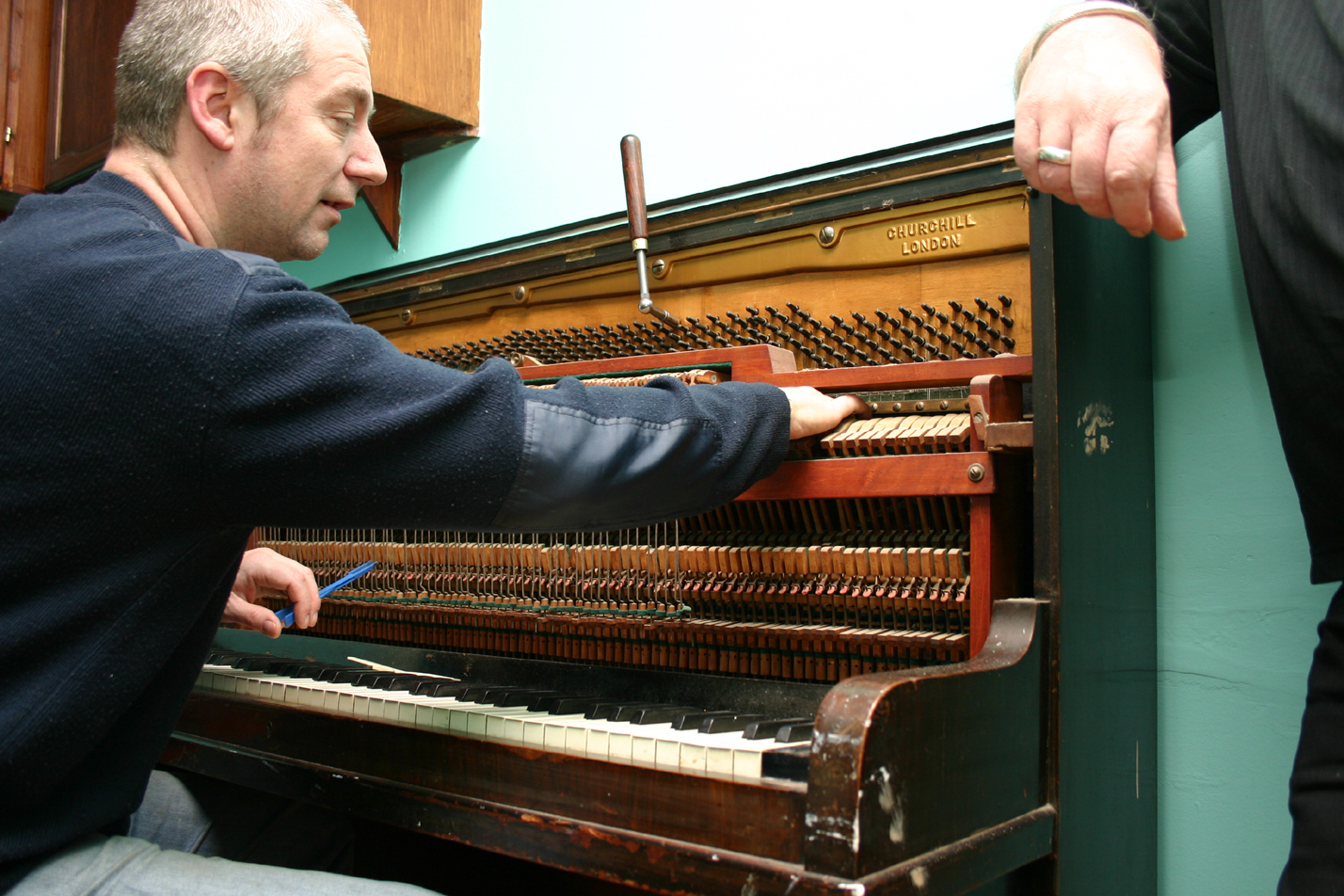 Piano tuner